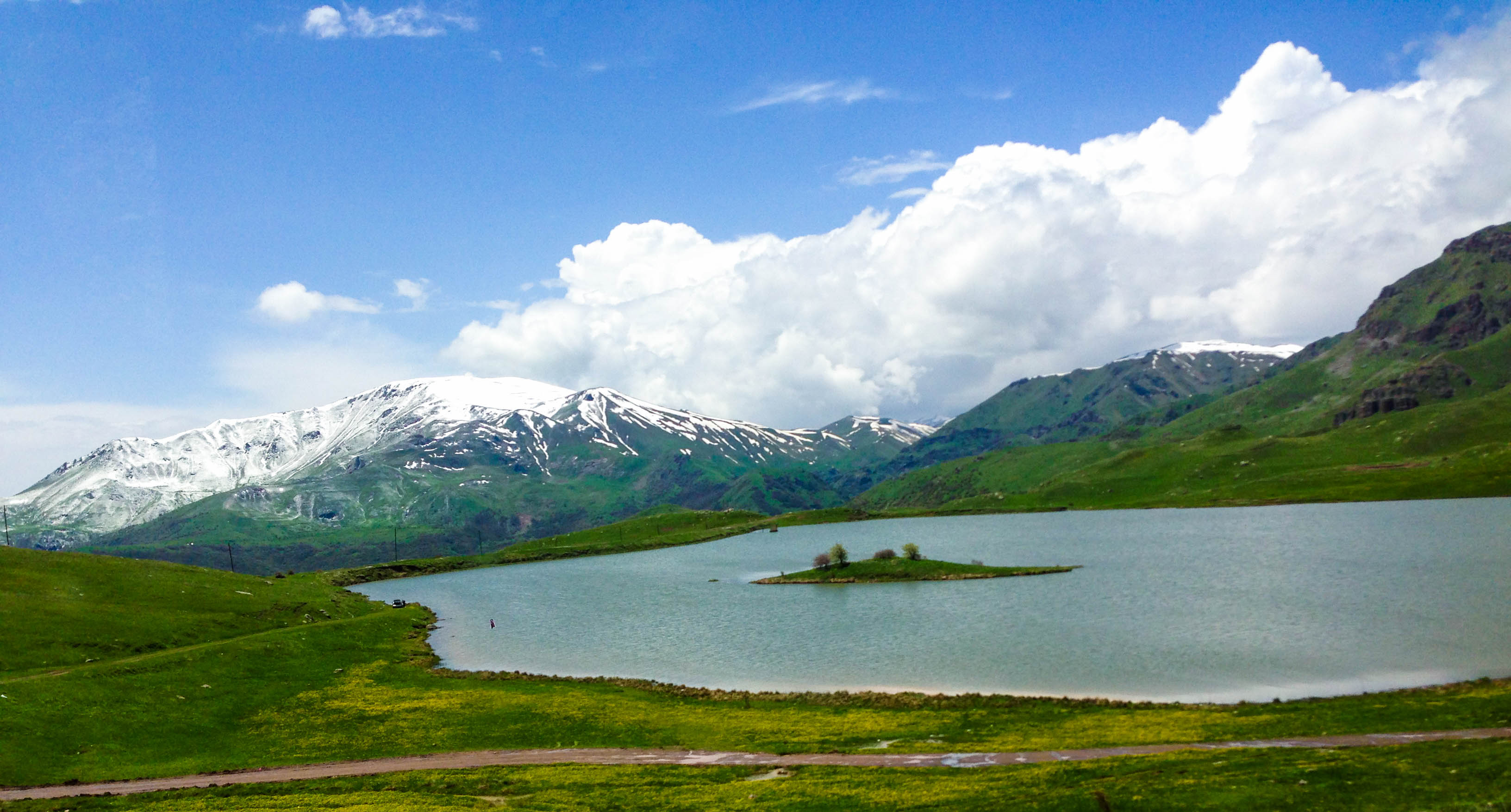 Batabat gölü 2018-ci ilin iyununda